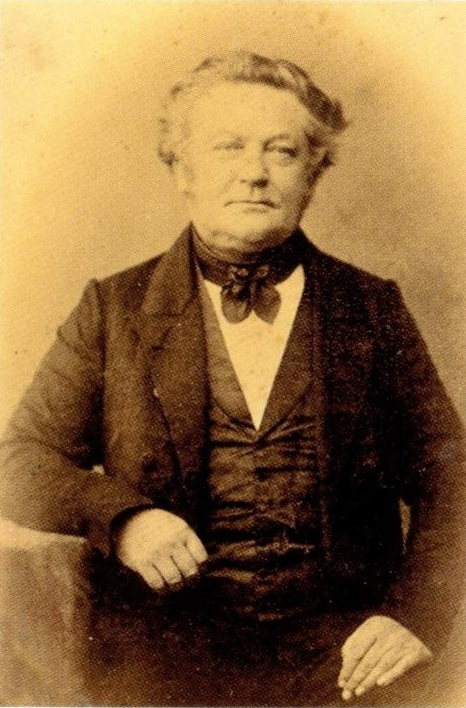 Zeitgenössisches Bild von Ludolf Conrad Hannibal Bargum (* 28. Mai 1802 in Leck; † 5. Juli 1866)